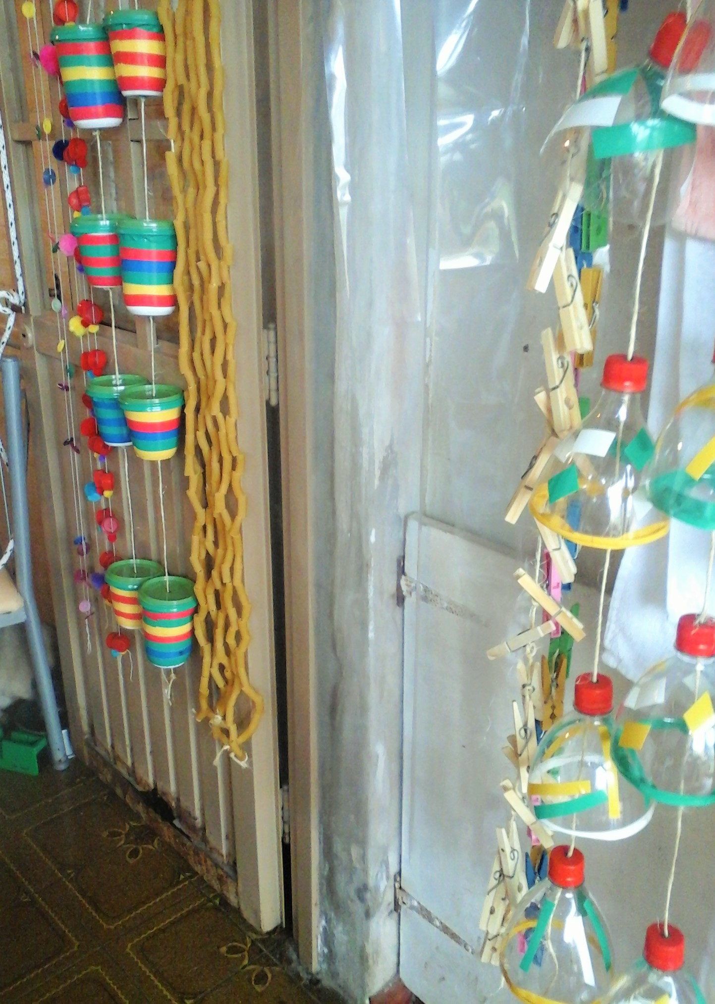 Cortina didáctica de exploración de sonidos para niños